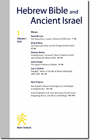 Titelabbildung der Zeitschrift Hebrew Bible and Ancient Israel (HeBAI), die im Mohr Siebeck Verlag. Tübingen erscheint.